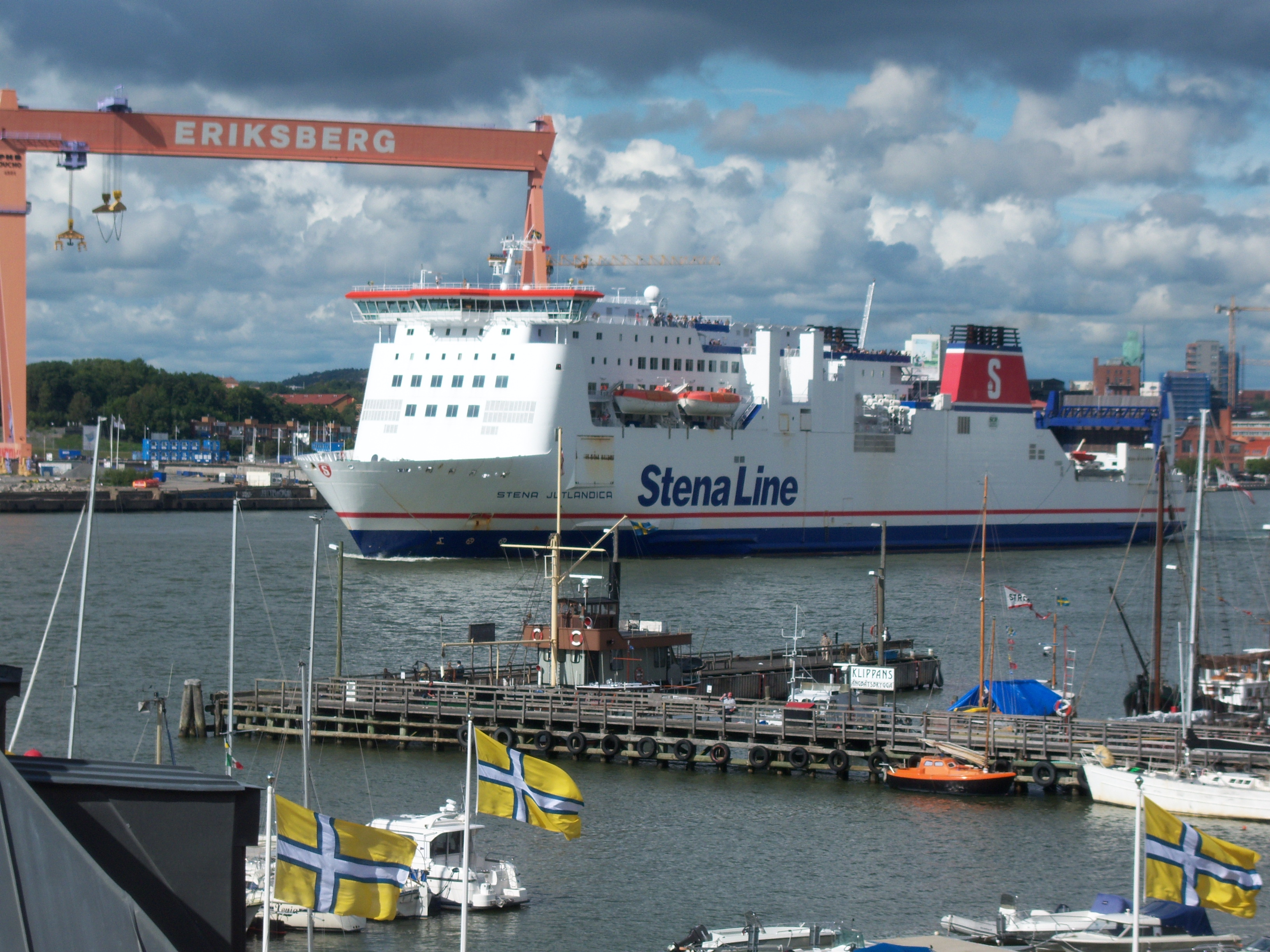 De Stena Jutlandica bij vertrek uit Goteborg.